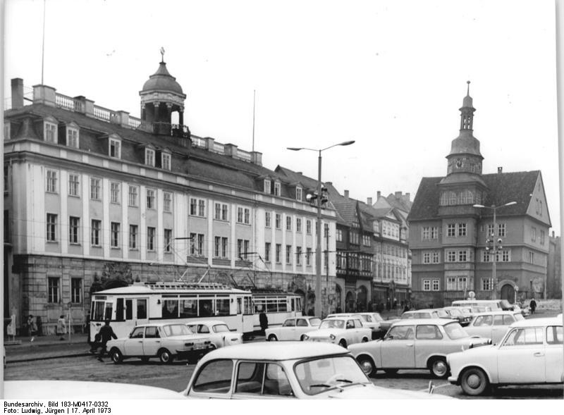 Eisenach, Marktplatz, Stadtschloss ADN-ZB Ludwig Bg-Schm 17.4.1973 Bez. Erfurt: Blick auf den Marktplatz von Eisenach, links das 1742 erbaute neue Stadtschloß, in dem heute u. a. das Thüringer Museum untergebracht ist.